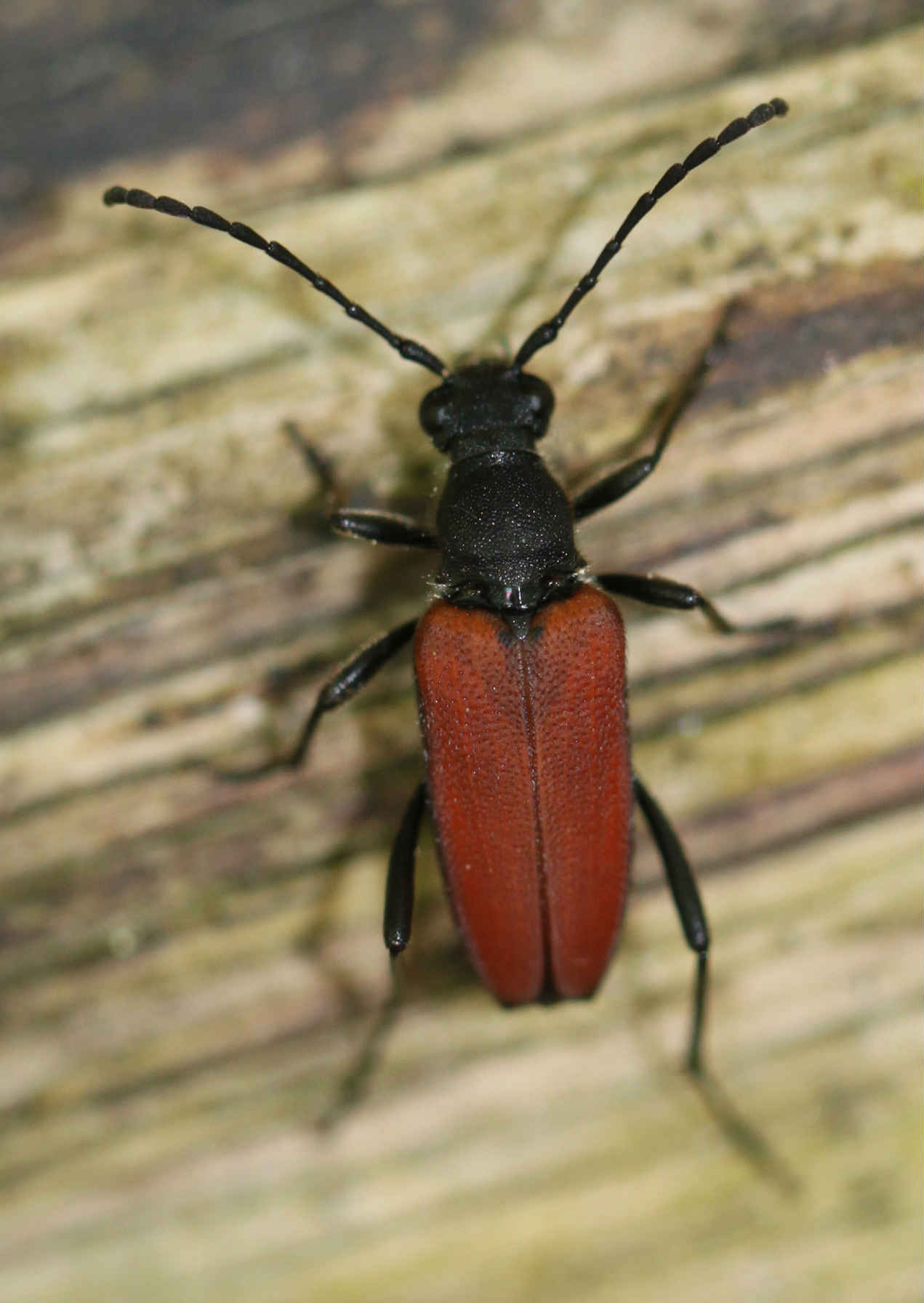 Blutroter Halsbock (Anastrangalia sanguinolenta), Weibchen, am 14.6.2017 im Pfälzerwald